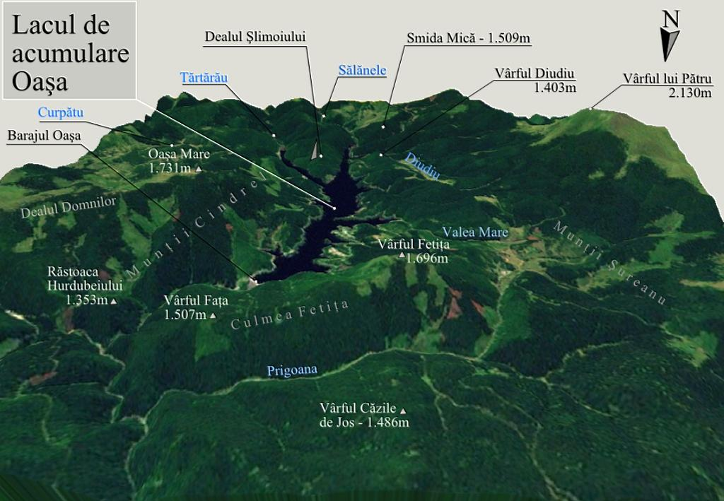 Harta 3D pentru Lacul de acumulare Oasa, Romania.